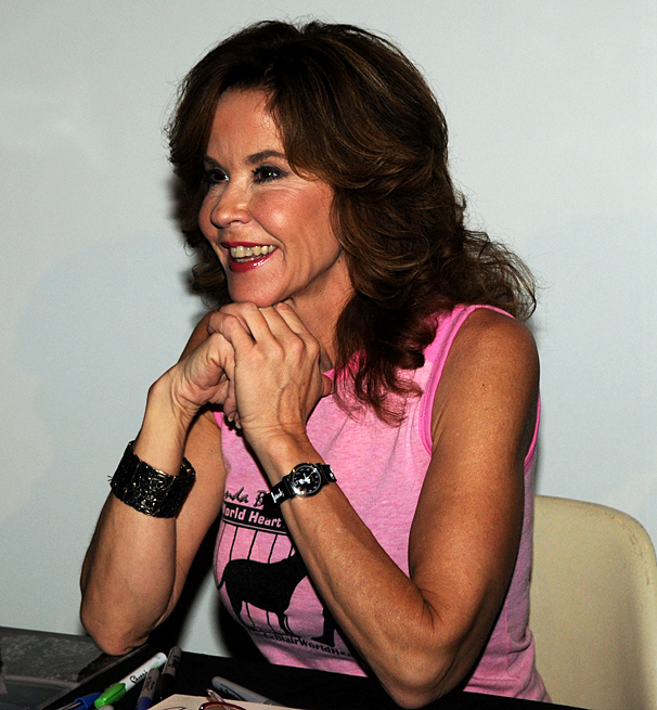 Linda Blair auf der 9. Weekend of Horrors in Bottrop (NRW)